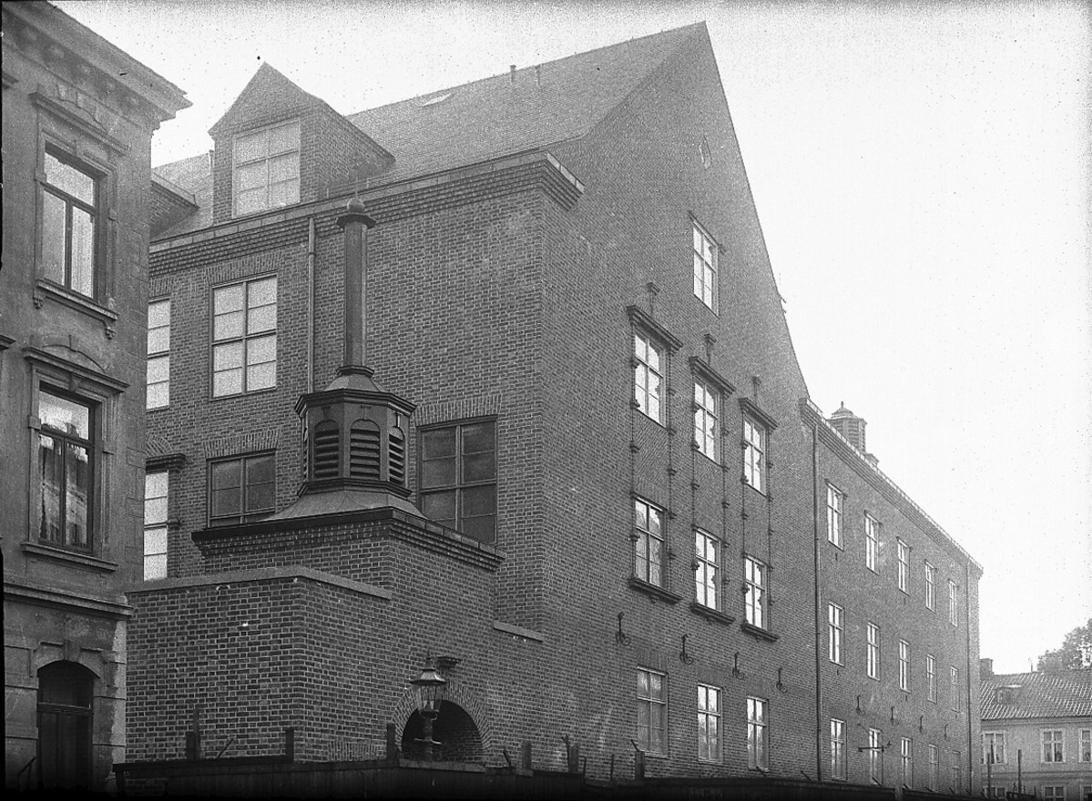 Sagene skole, fasaden mot Holsts gate, 1925